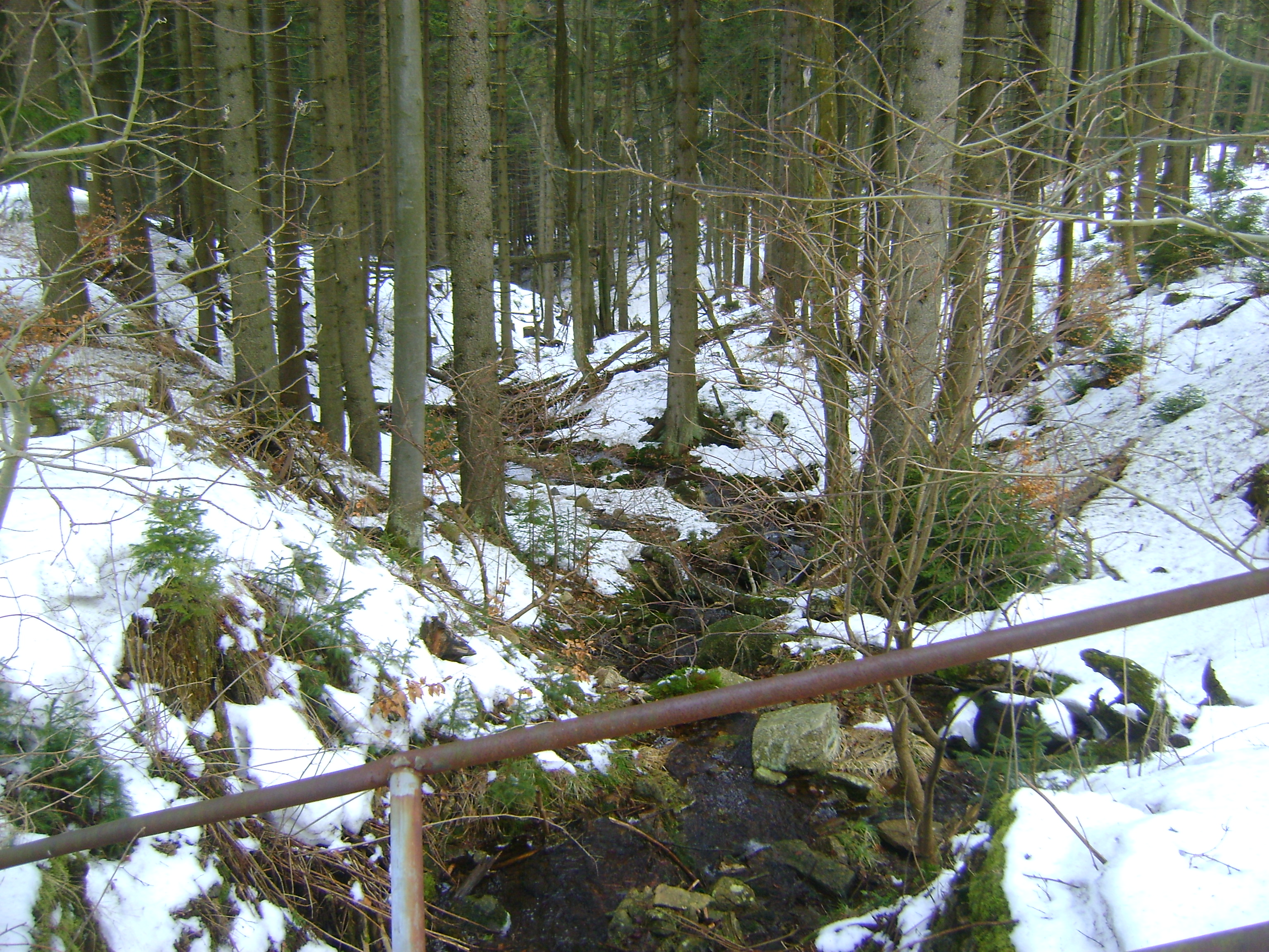 Goworówka – rzeka górska w południowej Polsce w woj. dolnośląskim w Sudetach Wschodnich